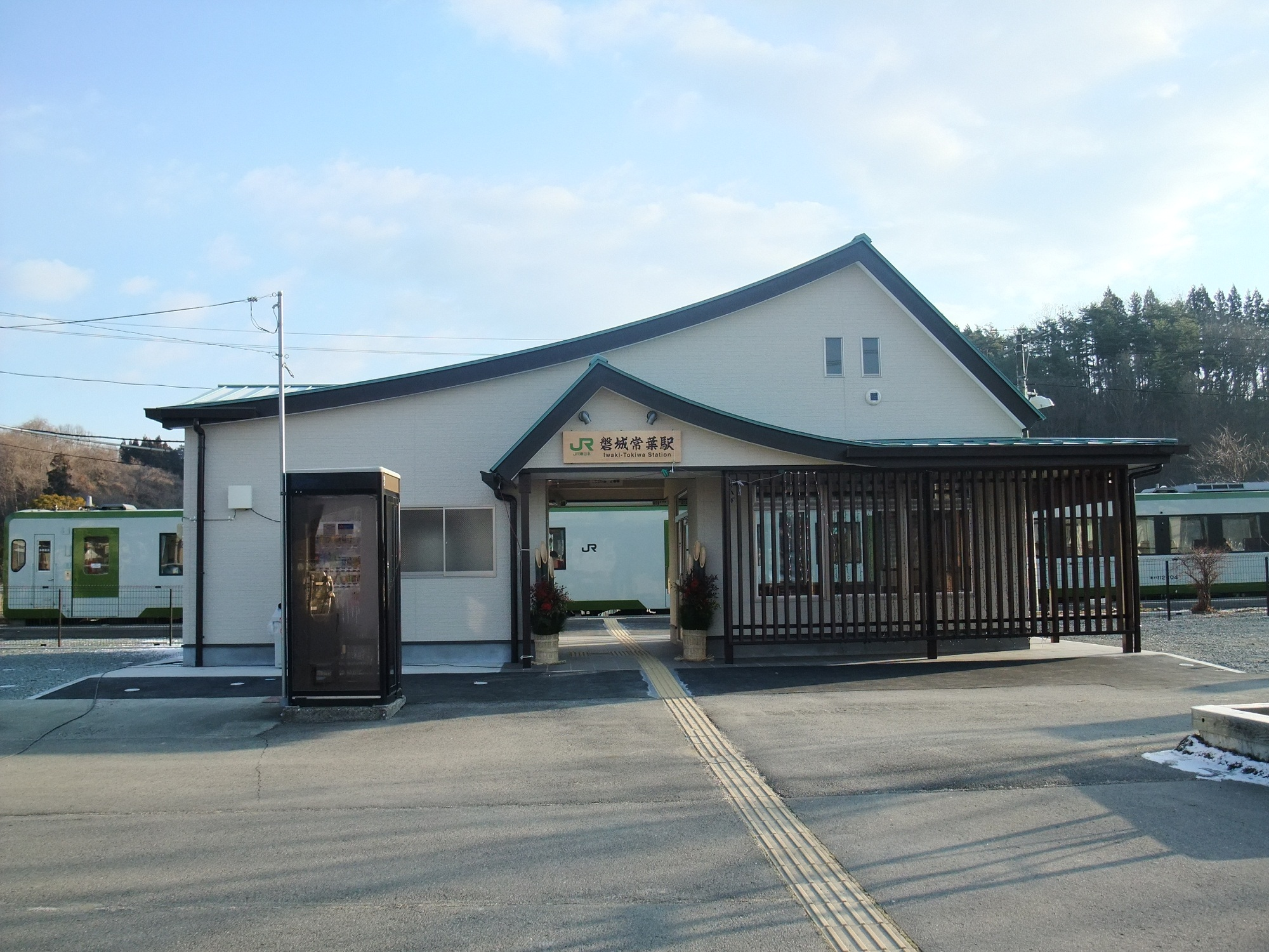 JR東日本磐越東線磐城常葉駅